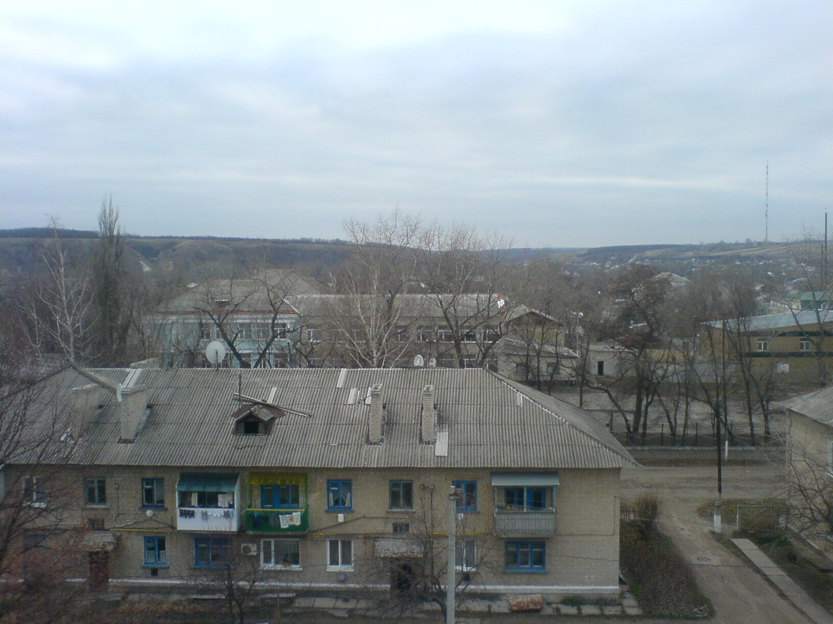 Вид с колокольни Николаеской церкви.Старобельск 2